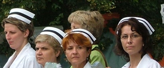 PL, Warsaw, Poland, Al. Ujazdowskie, Protest pielęgniarek